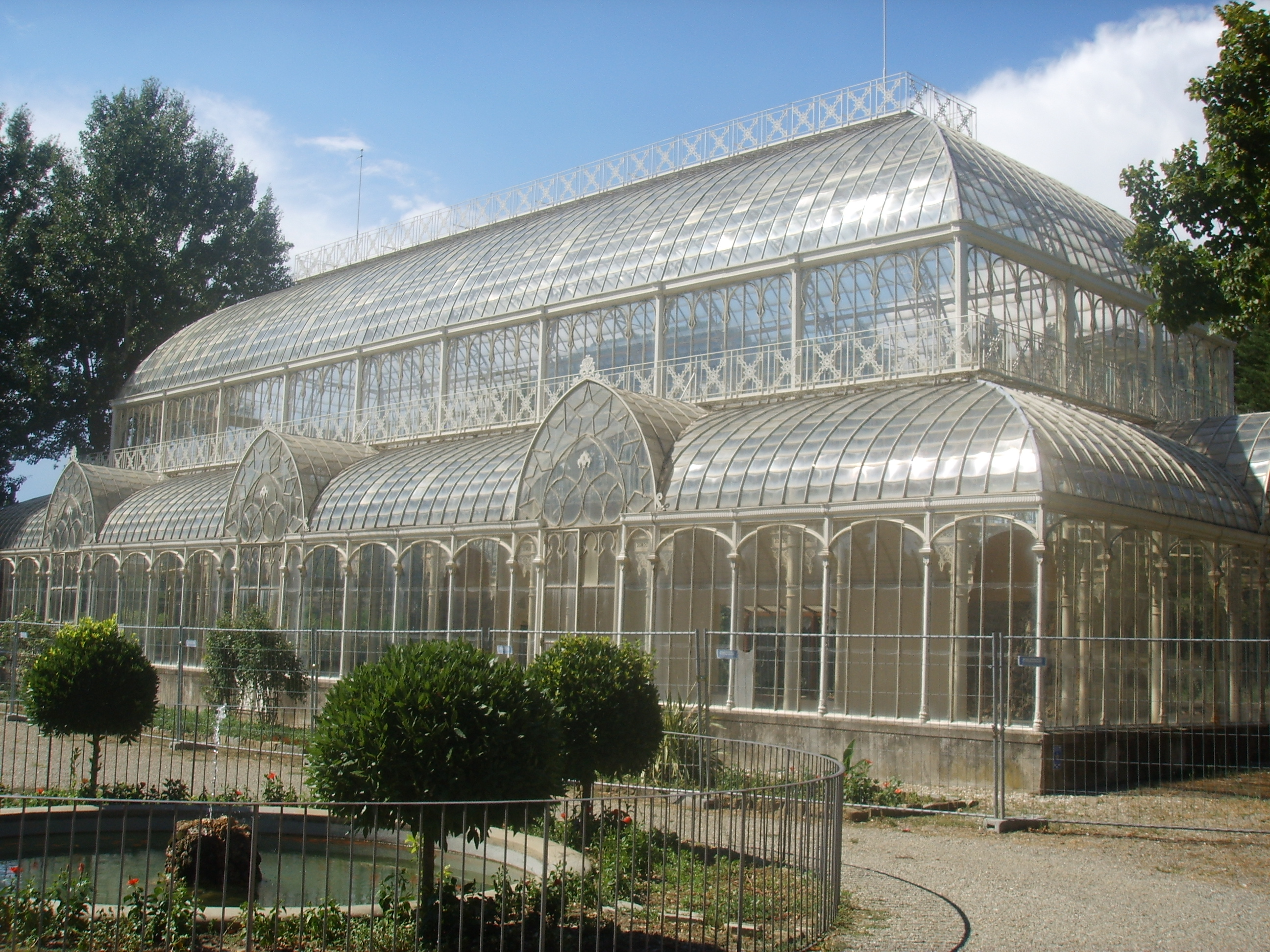 Orticultura Garden, Giardino dell'Orticultura in Florence, Italy